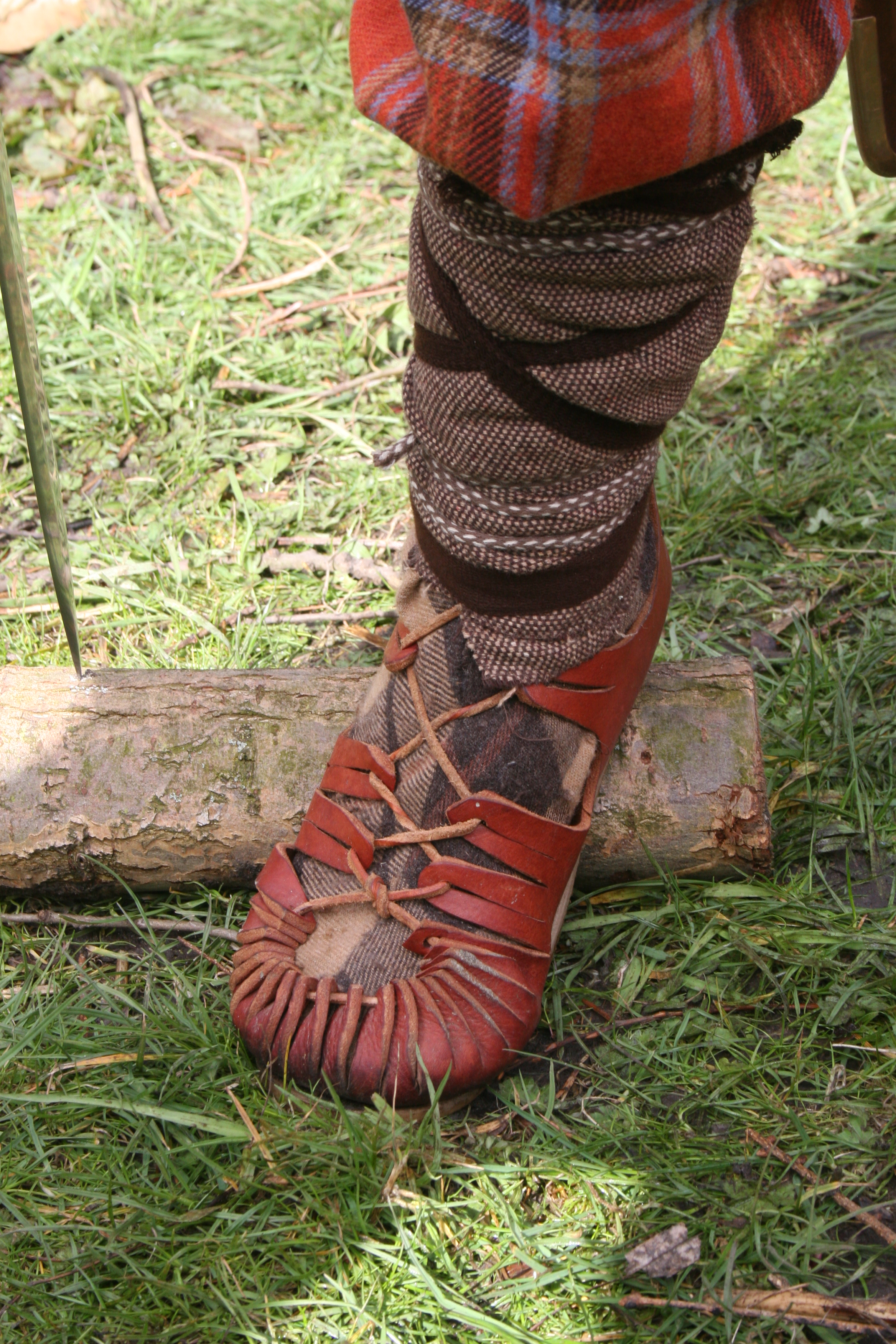 Schoeisel van legionair Romeinse leger. Living History groep Legio II Augusta, project Black Box en de Limes, Leiderdorp 2009